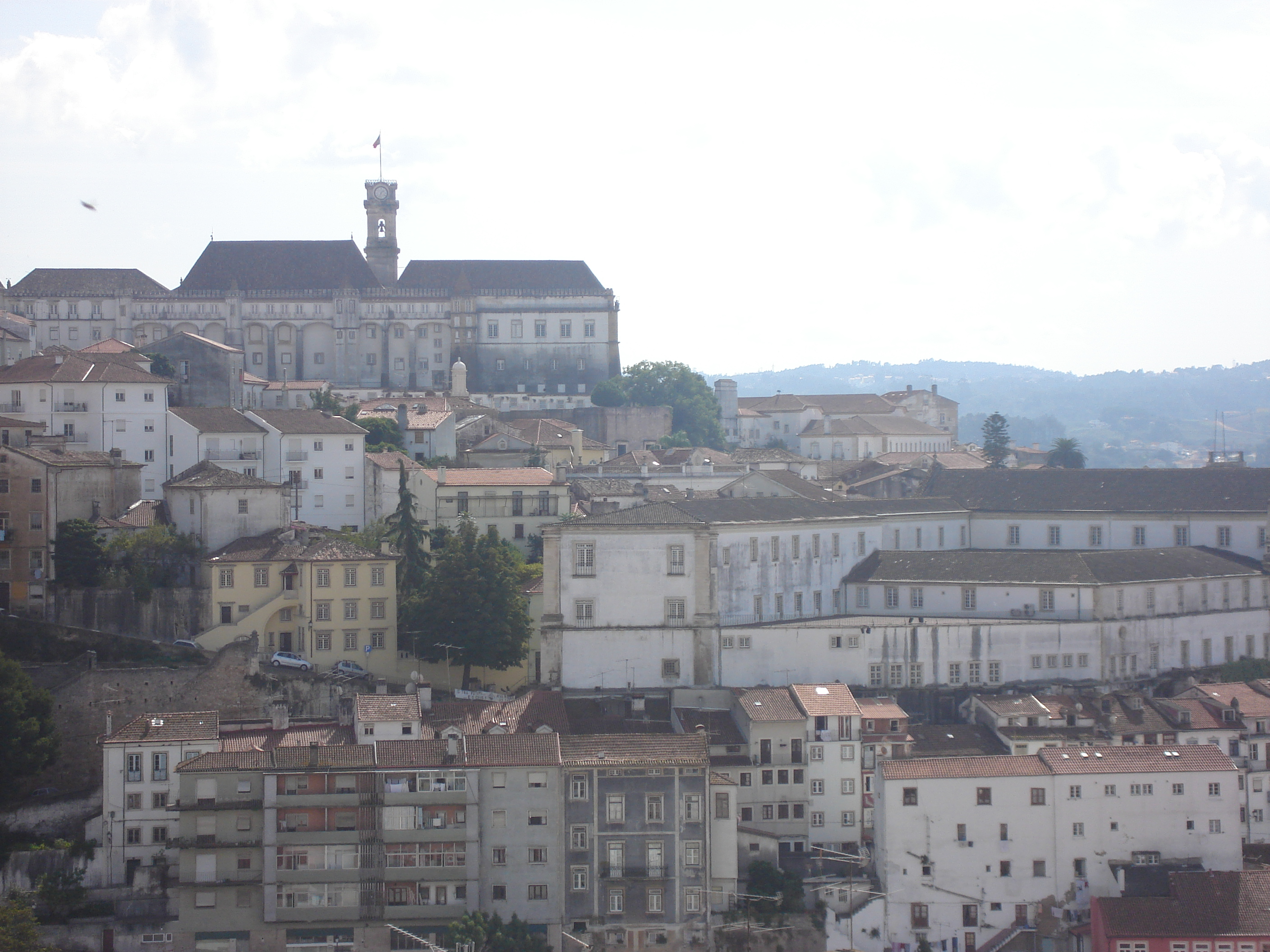 Coimbra şehri.Tepede üniversite gözüküyor.